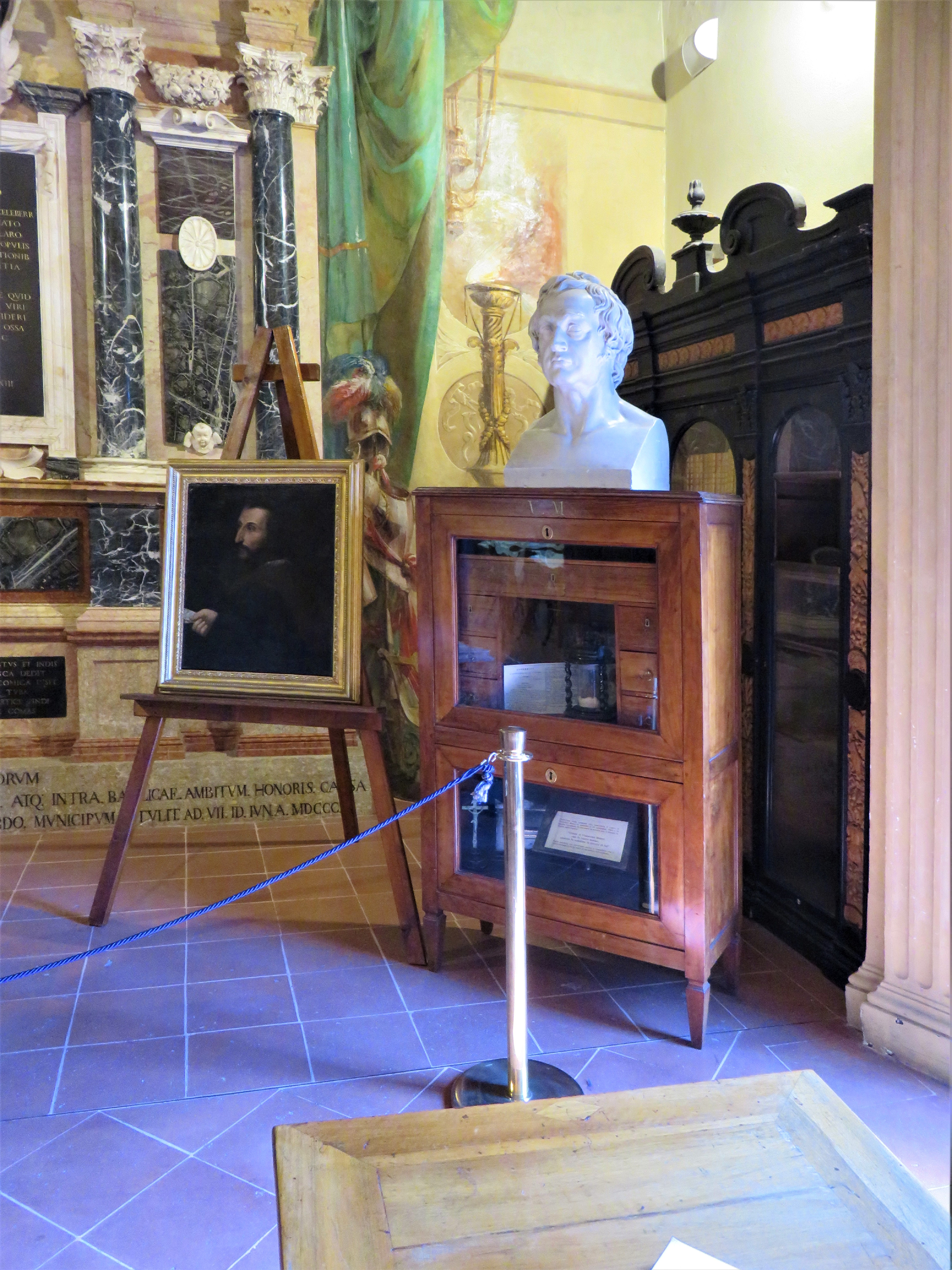 Il cuore di Vincenzo Monti è conservato alla Biblioteca Ariostea di Ferrara. Col cuore il crocifisso che teneva in mano al momento della morte.